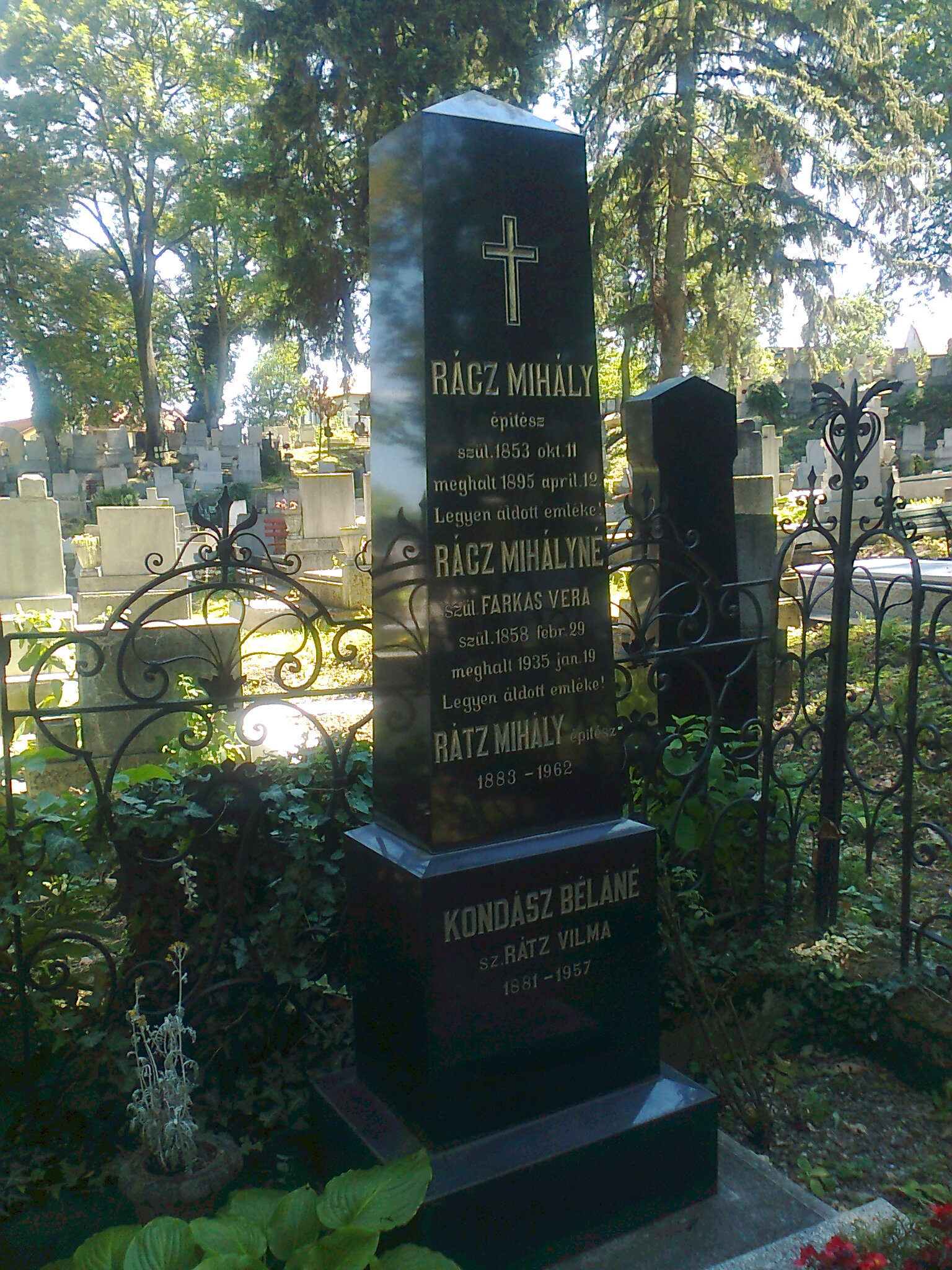 Rátz Mihály (1884-1962) kolozsvári építész sírja (Kolozsvár, Házsongárdi temető)